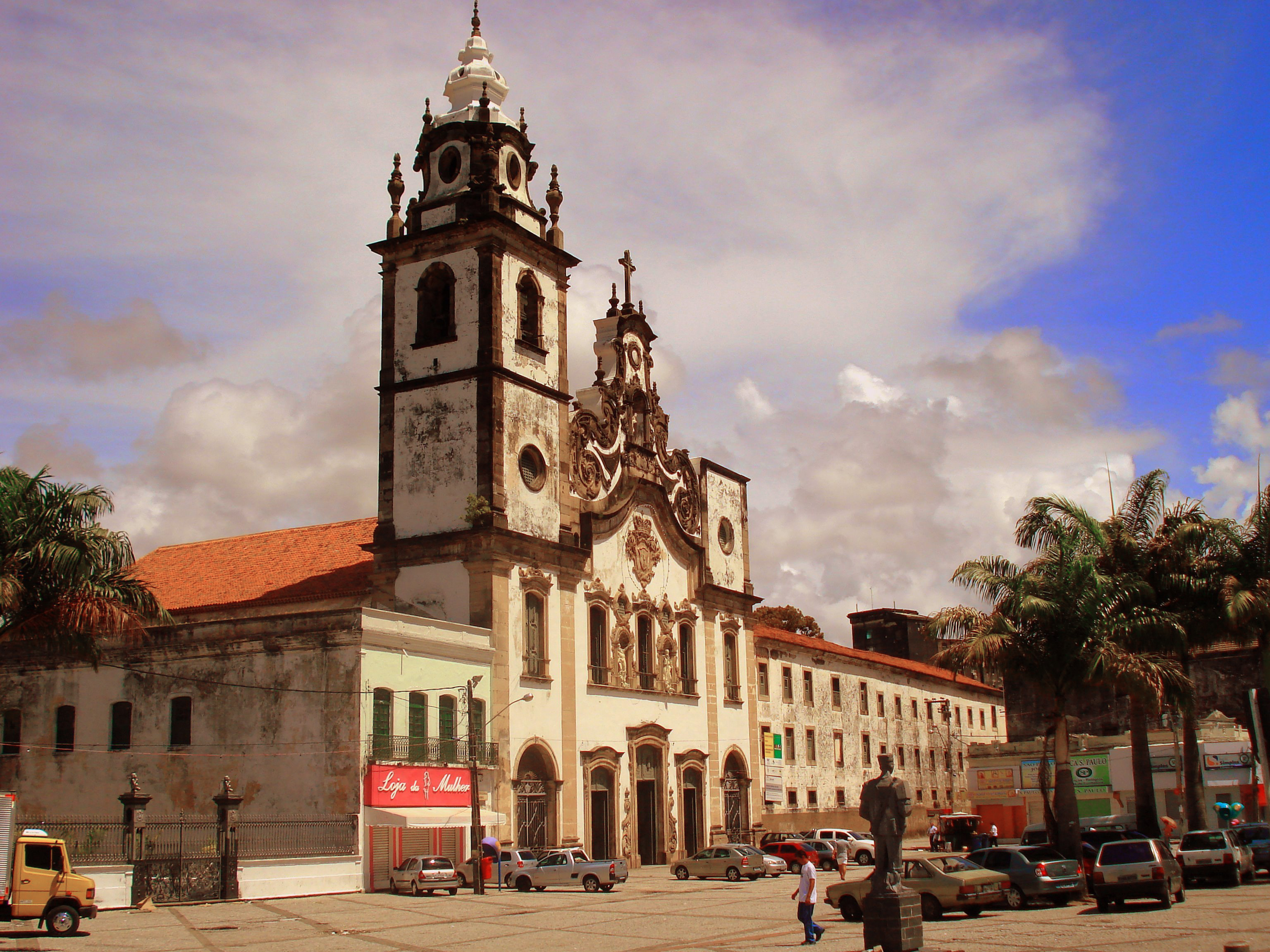 Igreja da Ordem Terceira de Nossa Senhora do Carmo